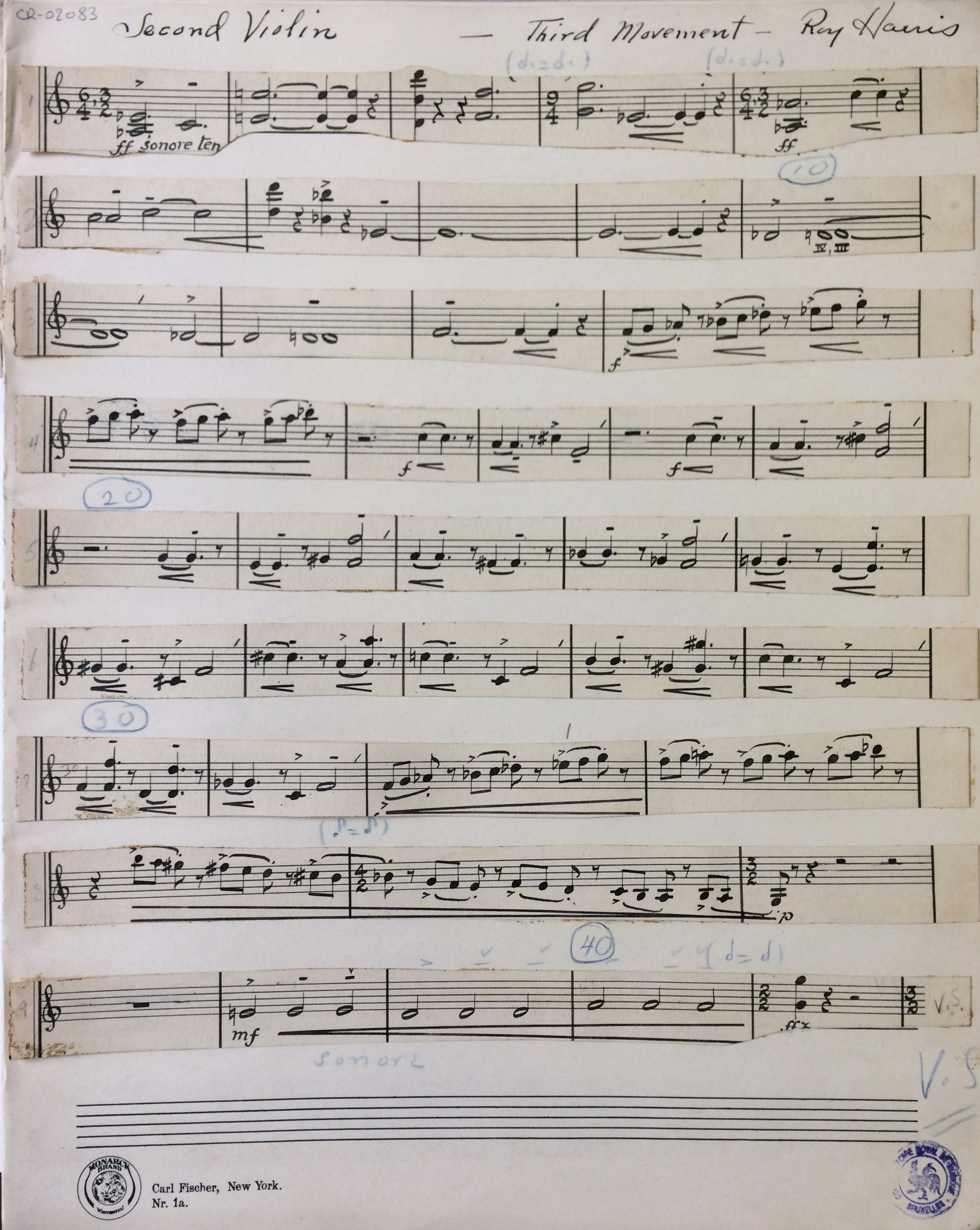 Roy Harris, Quatour n°2, version 1 (Bibliothèque du Conservatoire royal de Bruxelles, B-Bc, CR-02083)